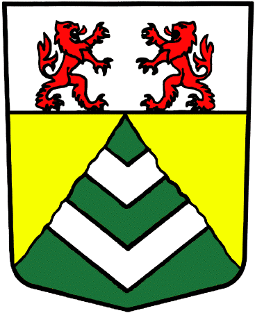 Wappen von Zeneggen Kanton Wallis Schweiz